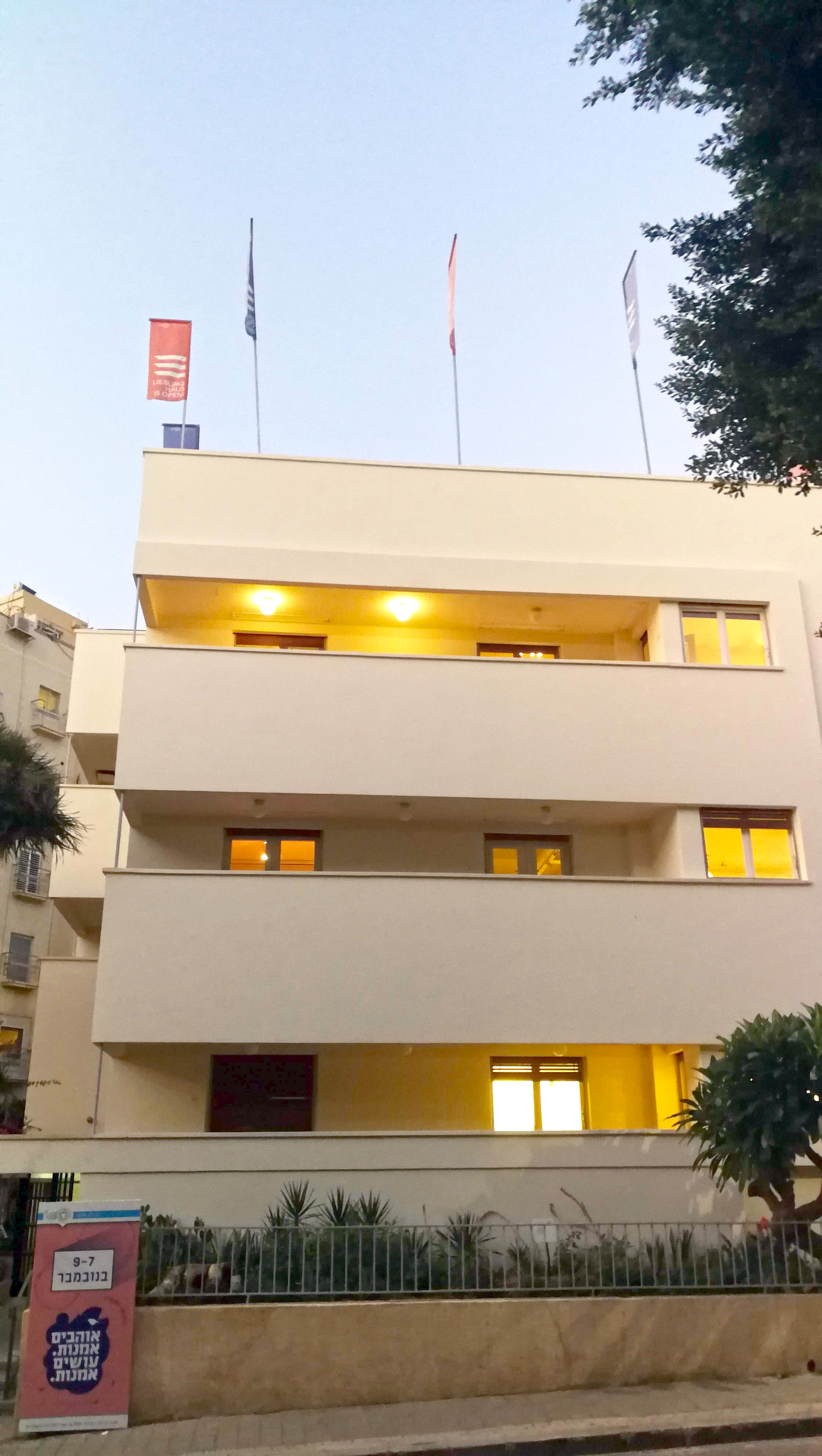 בית מקס ליבלינג, מרכז העיר הלבנה, בניין מודרניסטי בסגנון באוהאוס בעל משמעות אדריכלית. הבית ממוקם ברחוב אידלסון 29, תל אביב. תוכנן על ידי האדריכל דב כרמי ונבנה בשנת 1936.